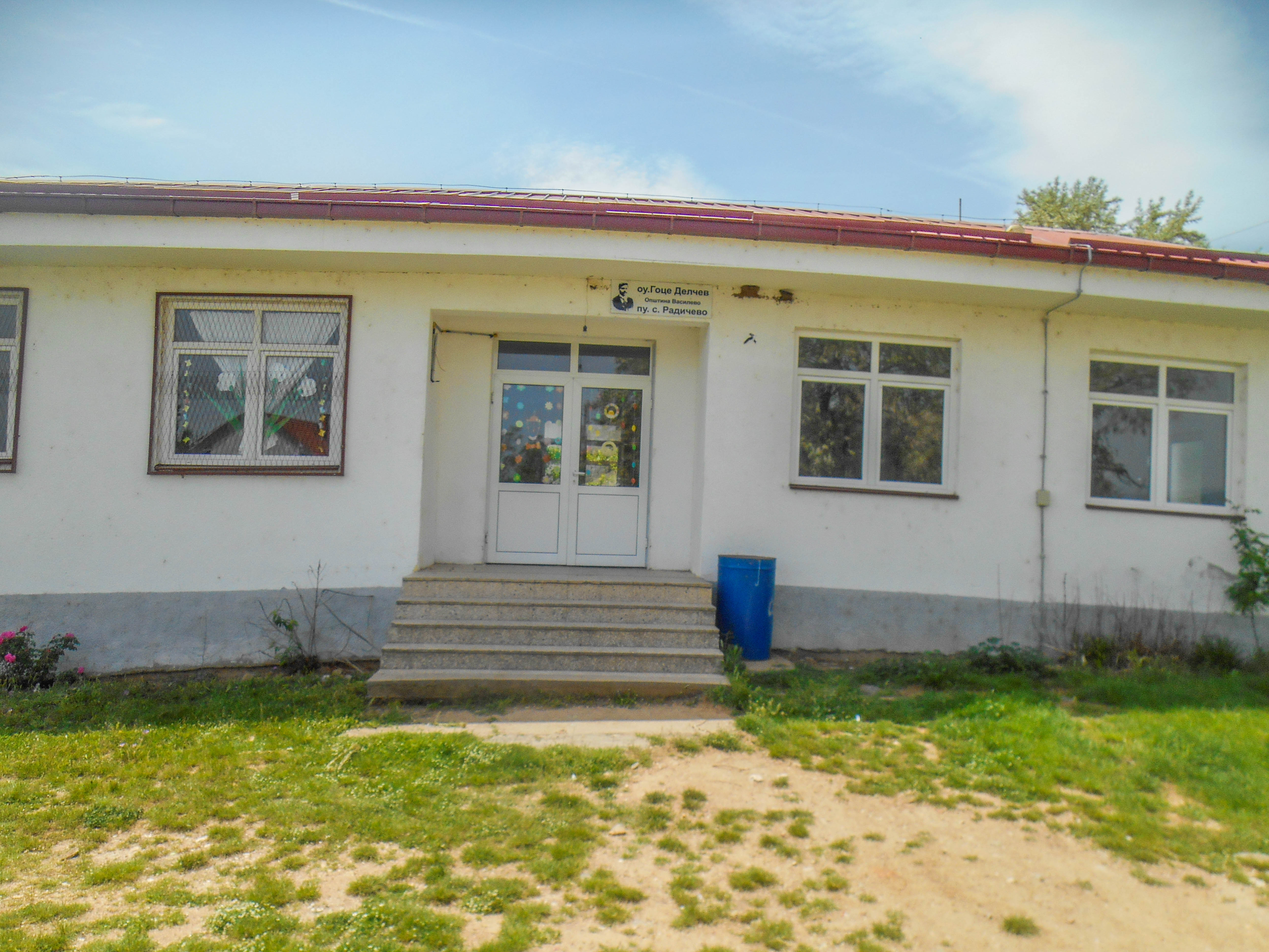 Основно училиште „Гоце Делчев“ - Радичево